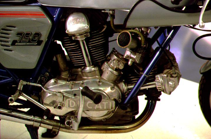 Ducati-750 Super Sport, italienisches Top-Motorradmodell der 1970er Jahre